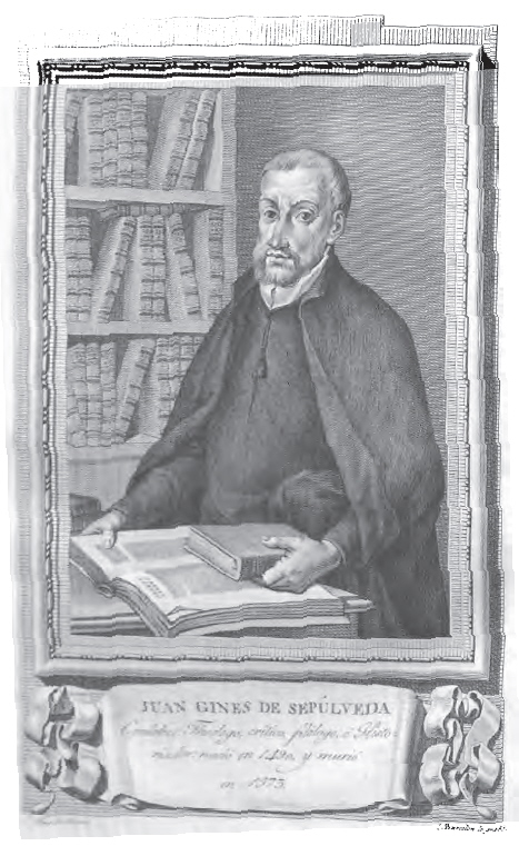 Retrato de Juan Ginés de Sepúlveda.